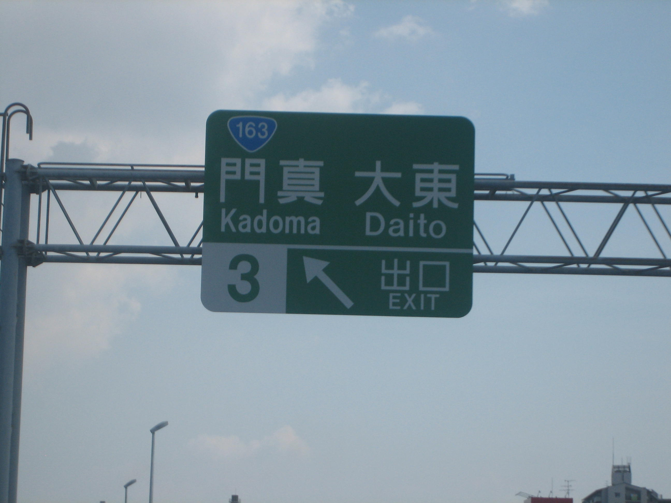 案内板。